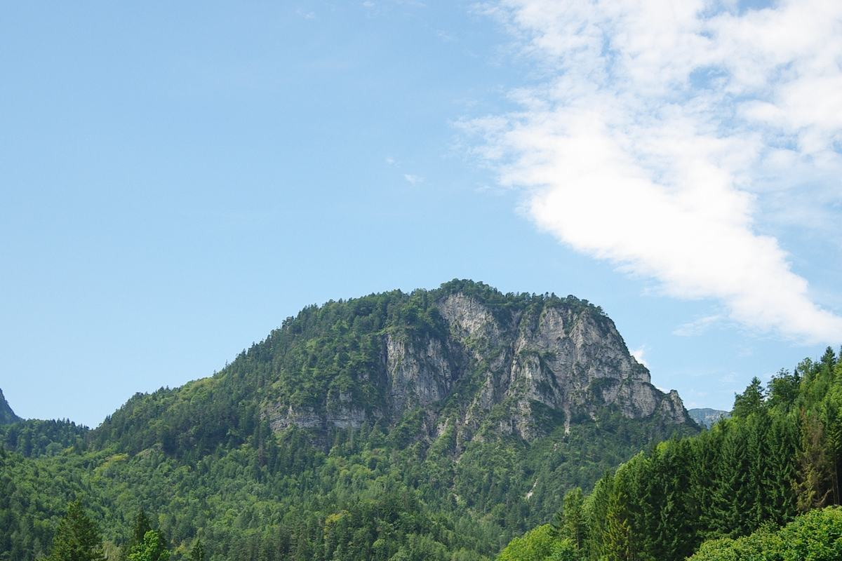 Gebersberg in Karlstein (mit Kranzlstoa)